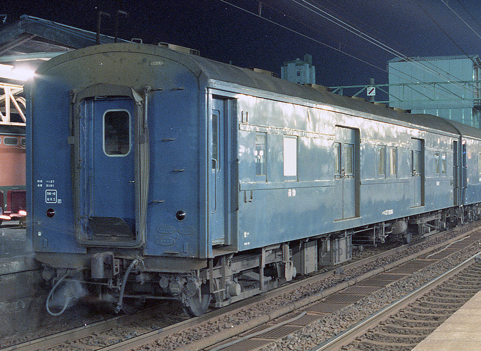 国鉄 マニ37 2006